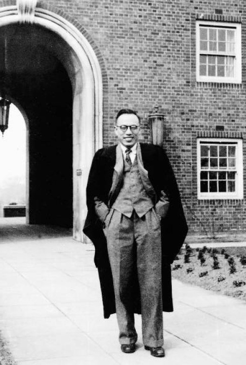 1946年侯仁之在利物浦大学宿舍大楼前